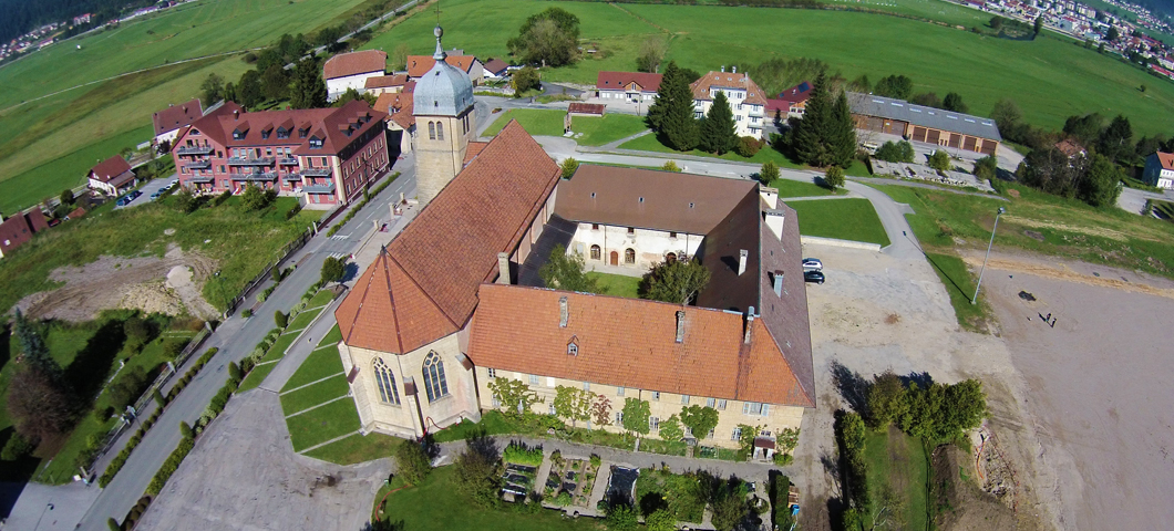 Eglise des Minimes